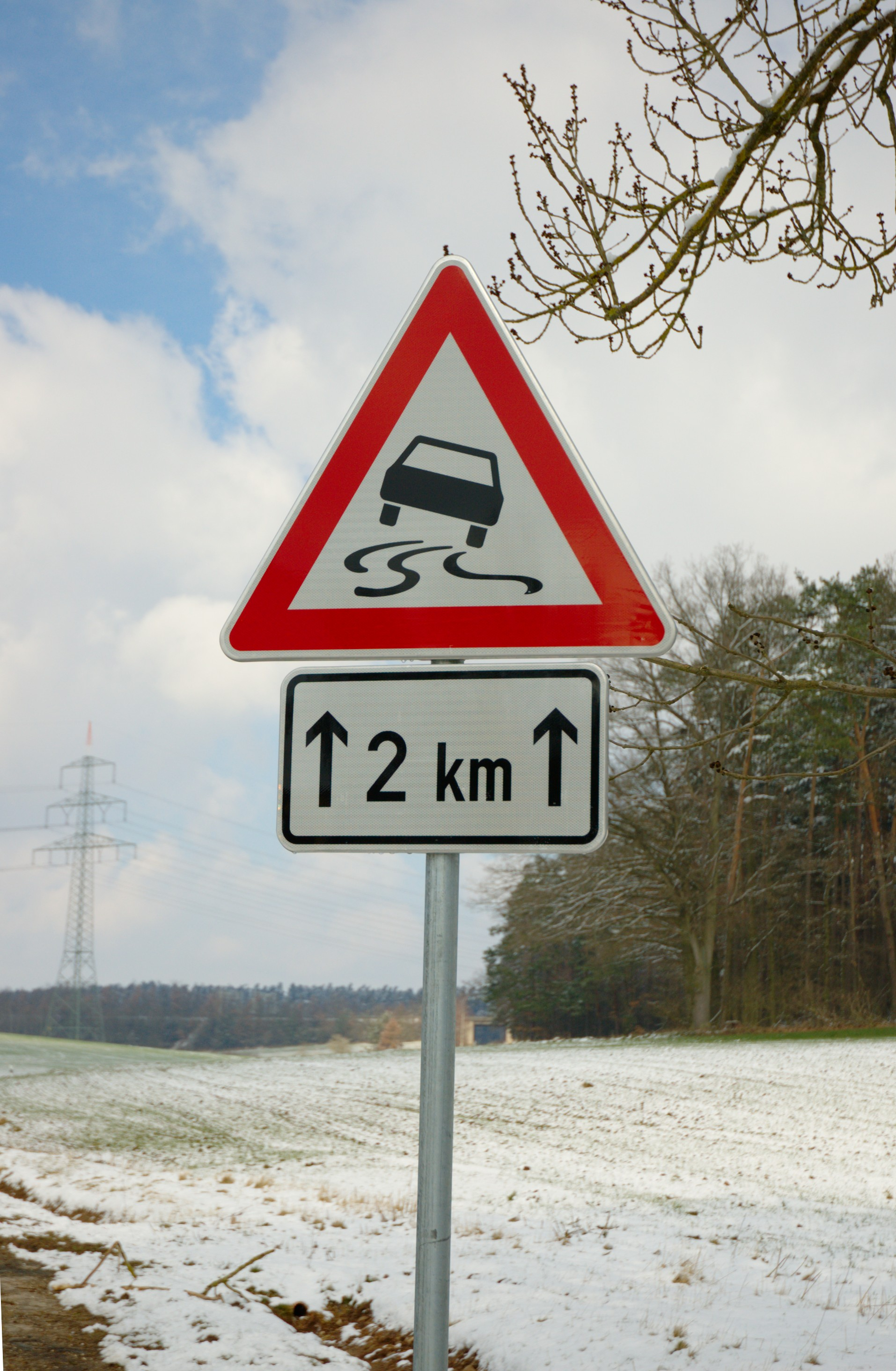 Verkehrszeichen 114 der StVO-Novelle von 1992: Schleudergefahr bei Nässe und Schmutz